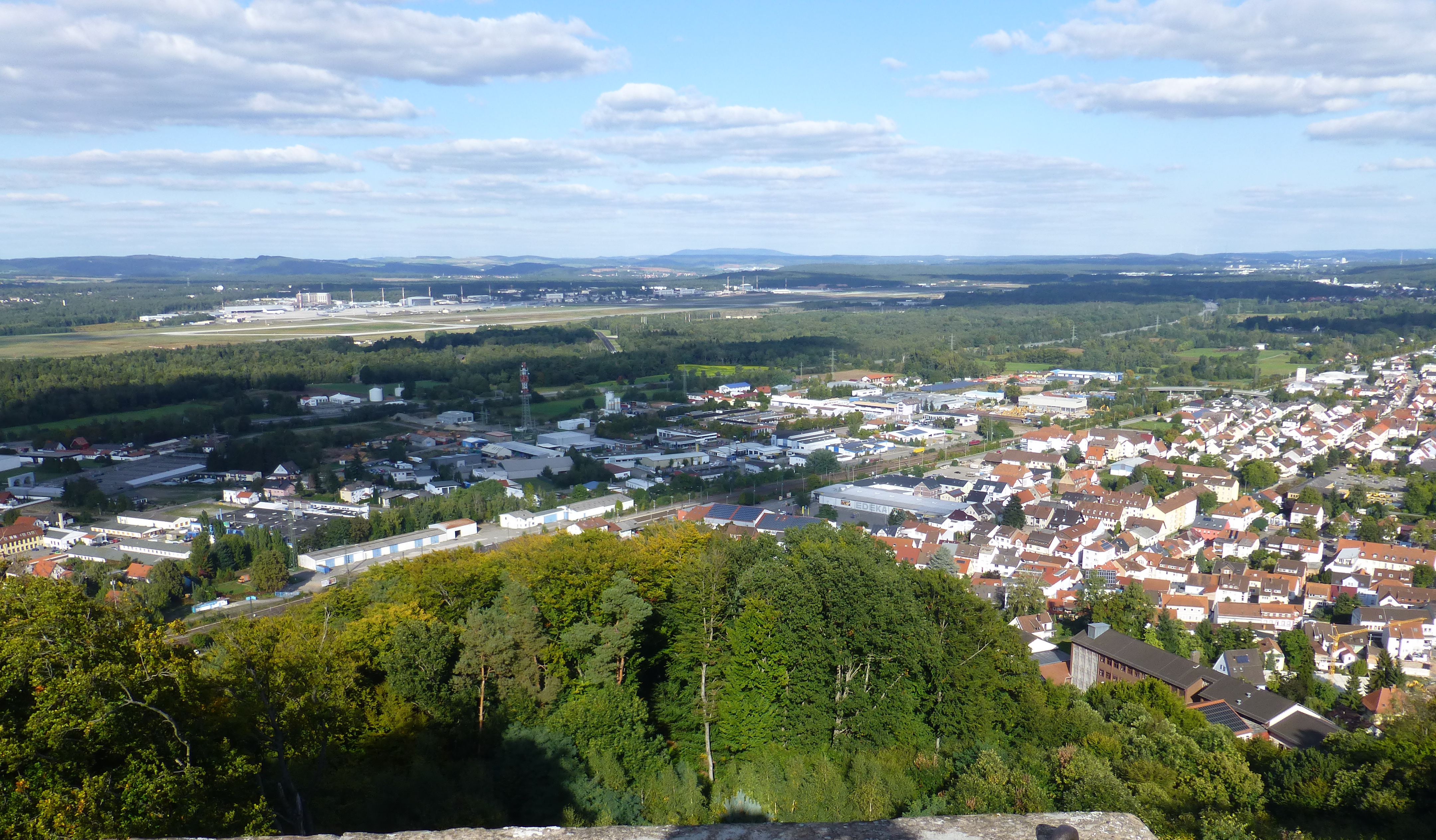 Bismarckturm (Landstuhl); Blick von der Plattform nordostwärts auf Landstuhl und die Ramstein Air Base; im Hintergrund der Donnersberg